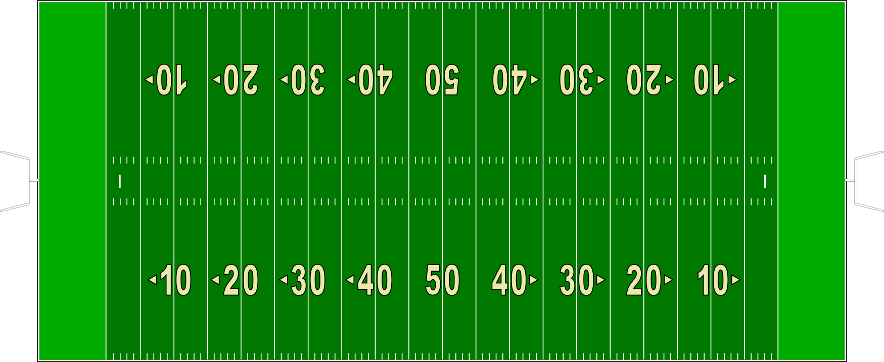 25px Schéma d'un terrain de football américain. Auteur : wagner51. Date de création : 2 février 2006. Image PNG issue d'une image vectorielle créée avec le logiciel Inkscape v0.43 sous Windows XP. 30px Outline of a canadian football field. Author : wagner51. Date of creation : 2006, 2nd february. PNG image from a vectorial image created with Inkscape v0.43 under Windows XP.